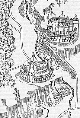 Кирилівський монастир у ХІІ ст. малюнок-реконструкція О.І. Кутового та В.А.Розенберга